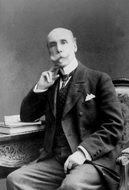 Retrato fotográfico de Alberto Blest Gana